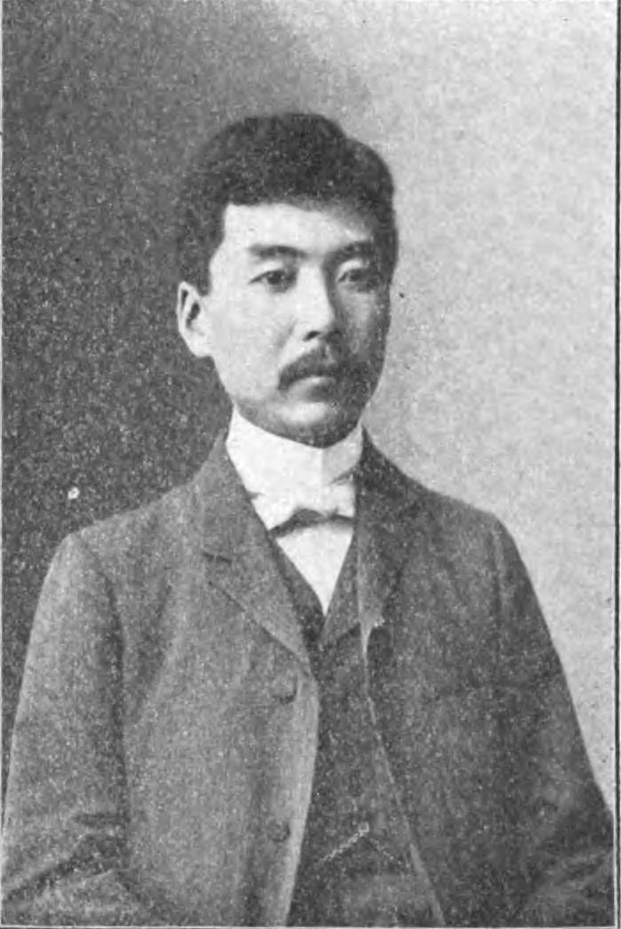 池田成彬（いけだ しげあき、1867〜1950）。慶應義塾大学卒業、第1次近衛内閣の大蔵相兼商工相。三井銀行筆頭常務理事。